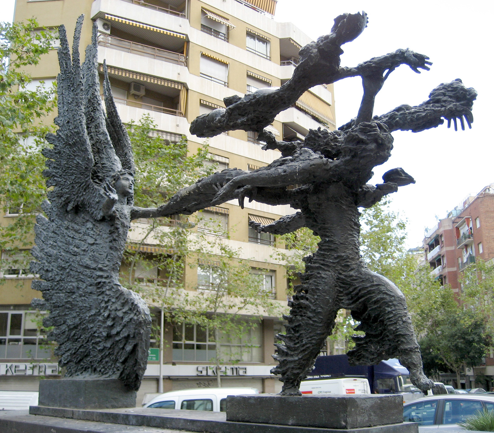 Apel·les Fenosa,El bon temps perseguint la tempesta,escultura pública en la avenida Gaudí de Barcelona.